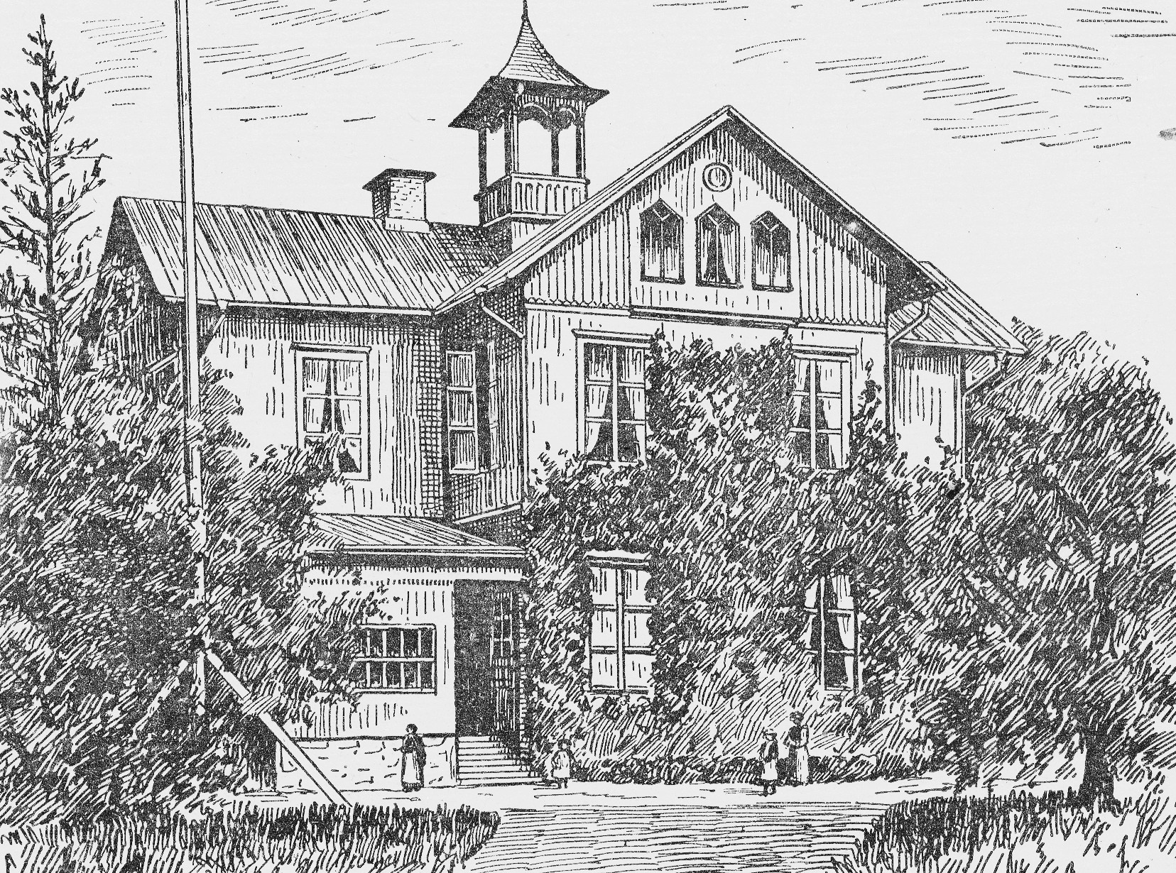 Stockholms alkoholisthem Eolshäll, huvudbyggnad (riven)